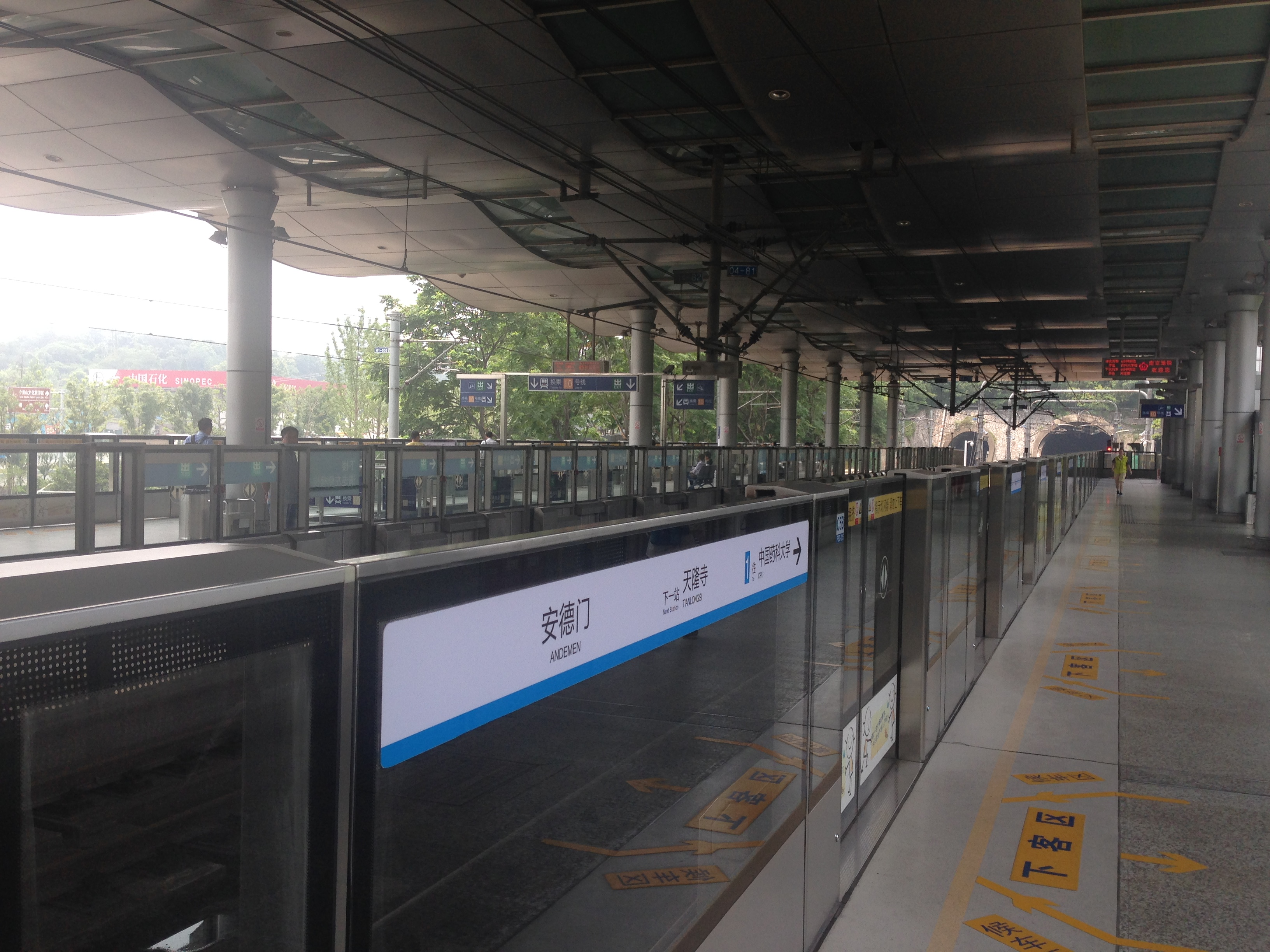 南京地铁1号线安德门站站台